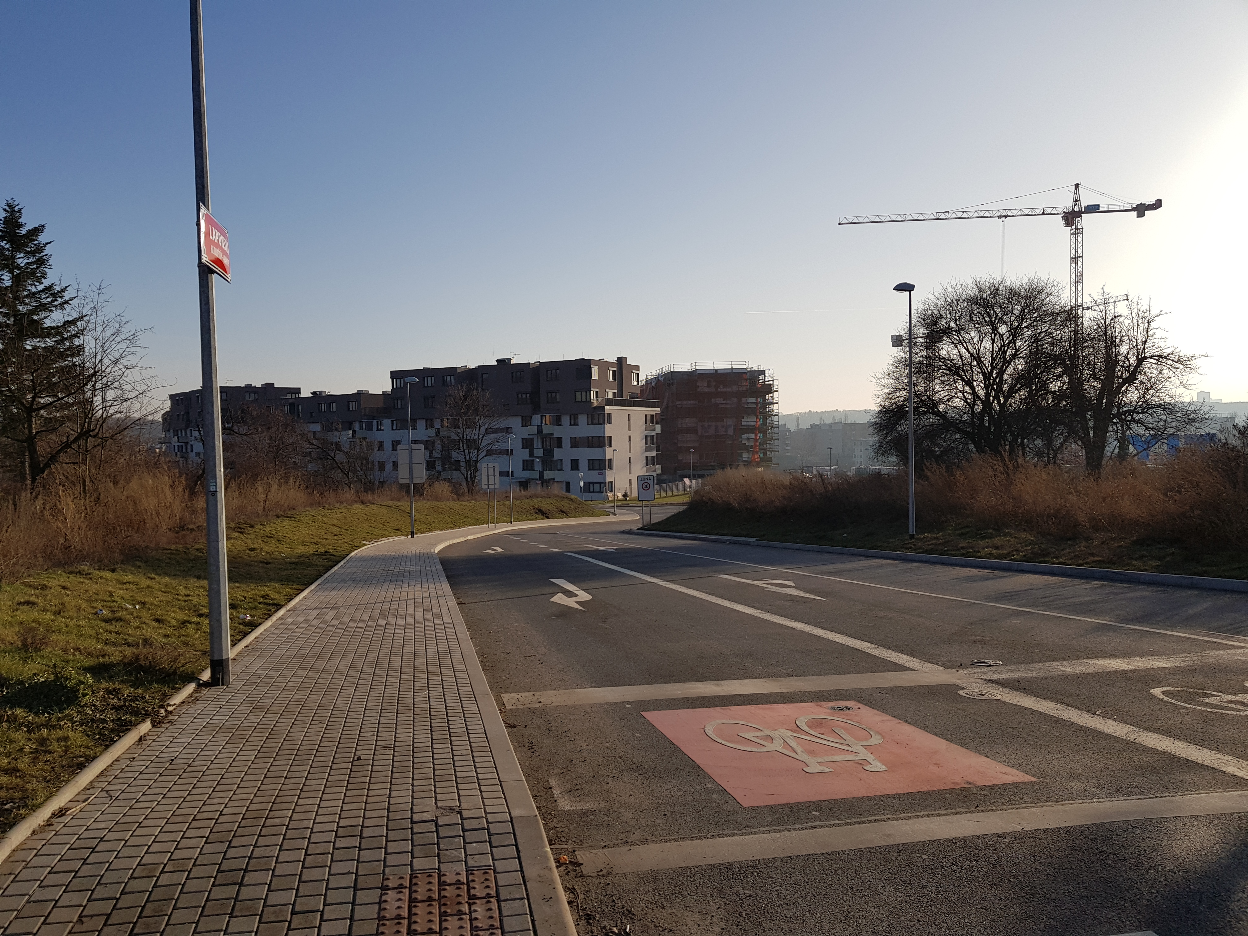 Ulice Laponská, Praha 9 - Hloubětín, pohled od ulice Kolbenovy jižním směrem